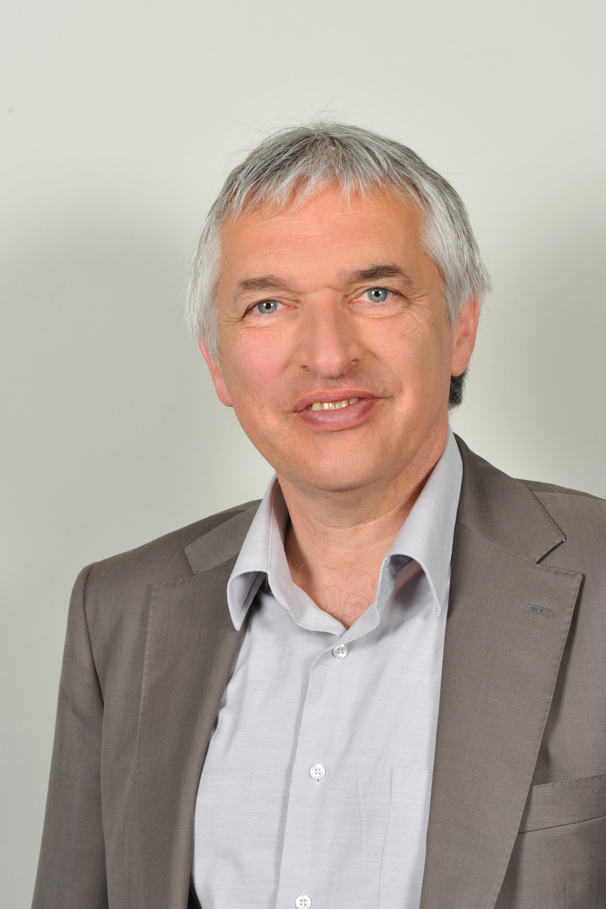 Landtagsprojekt Baden-Württemberg 2013: Jürgen Walter